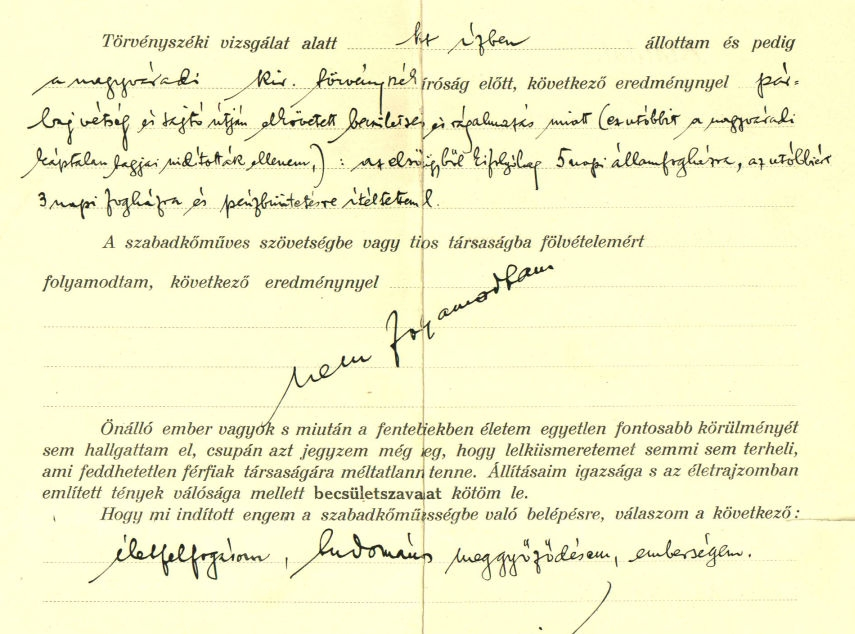 Ady Endre szabadkőműves jelentkezése 2. oldal